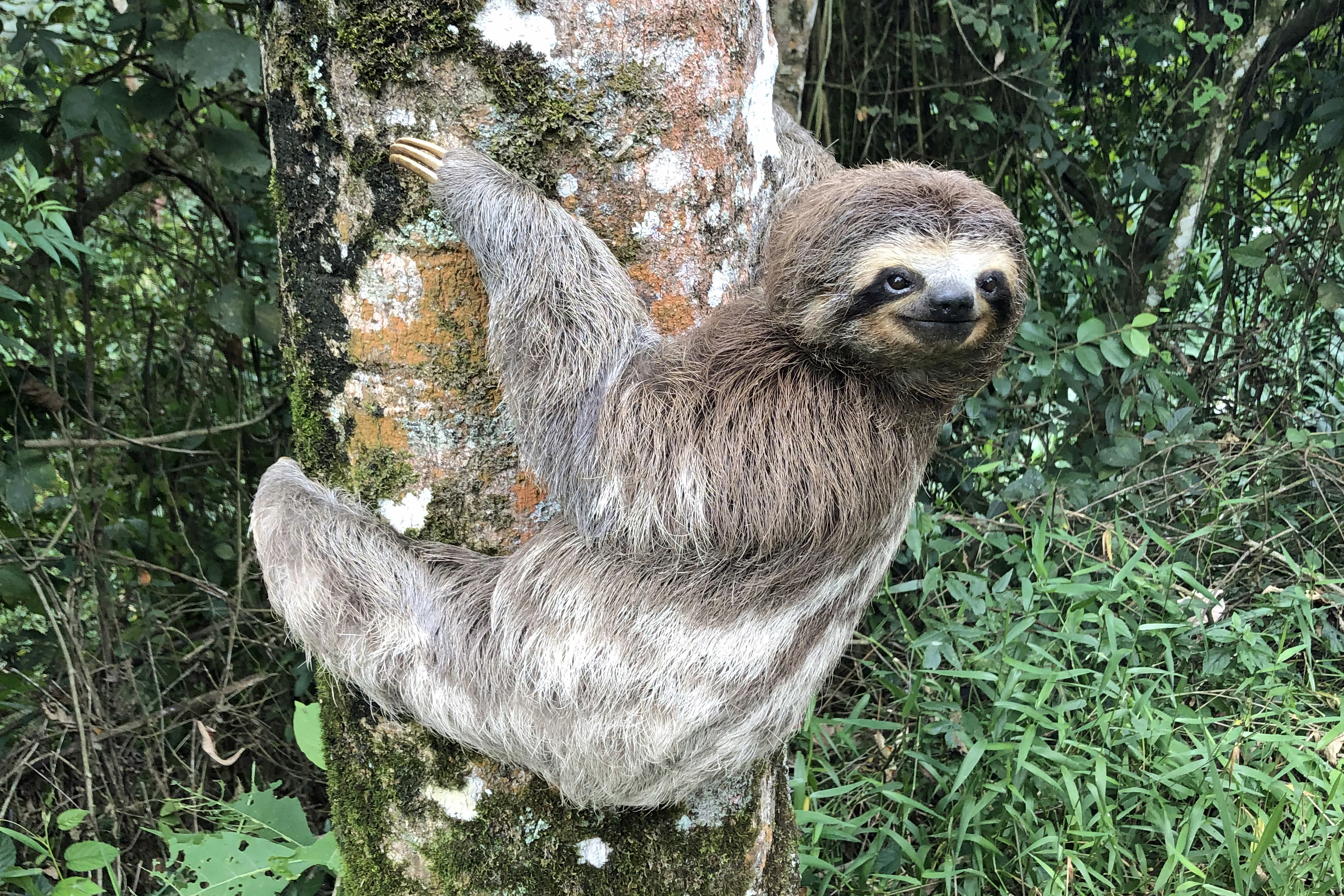 Preguiça-comum (Bradypus variegatus).